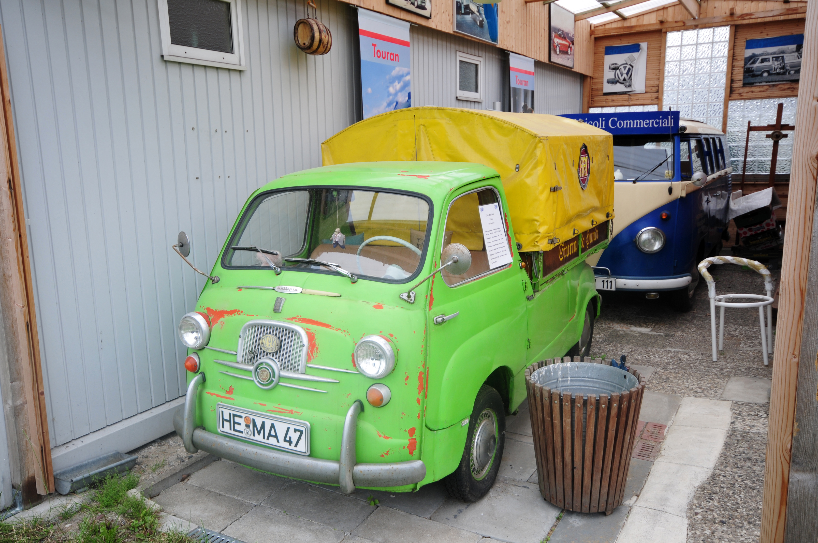 Automuseum Historische VW's Braunschweig